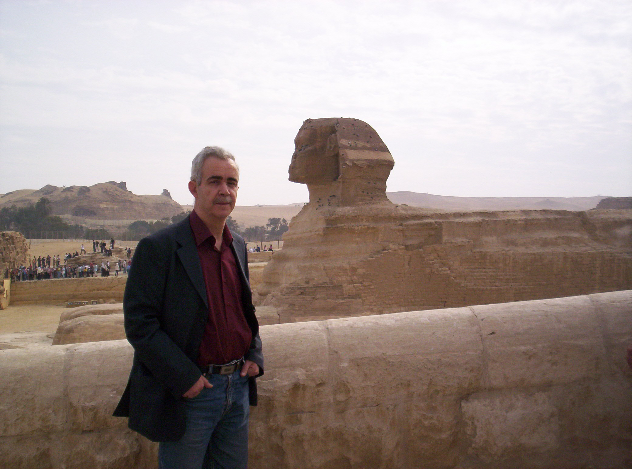 Tunisian Writer